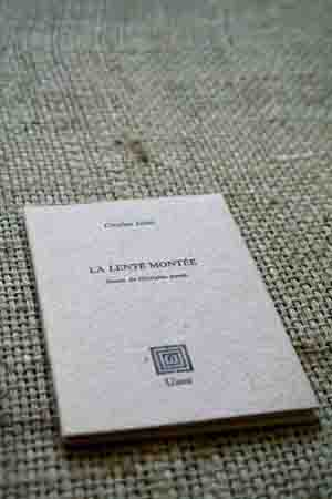 Armand Dupuy - 2006